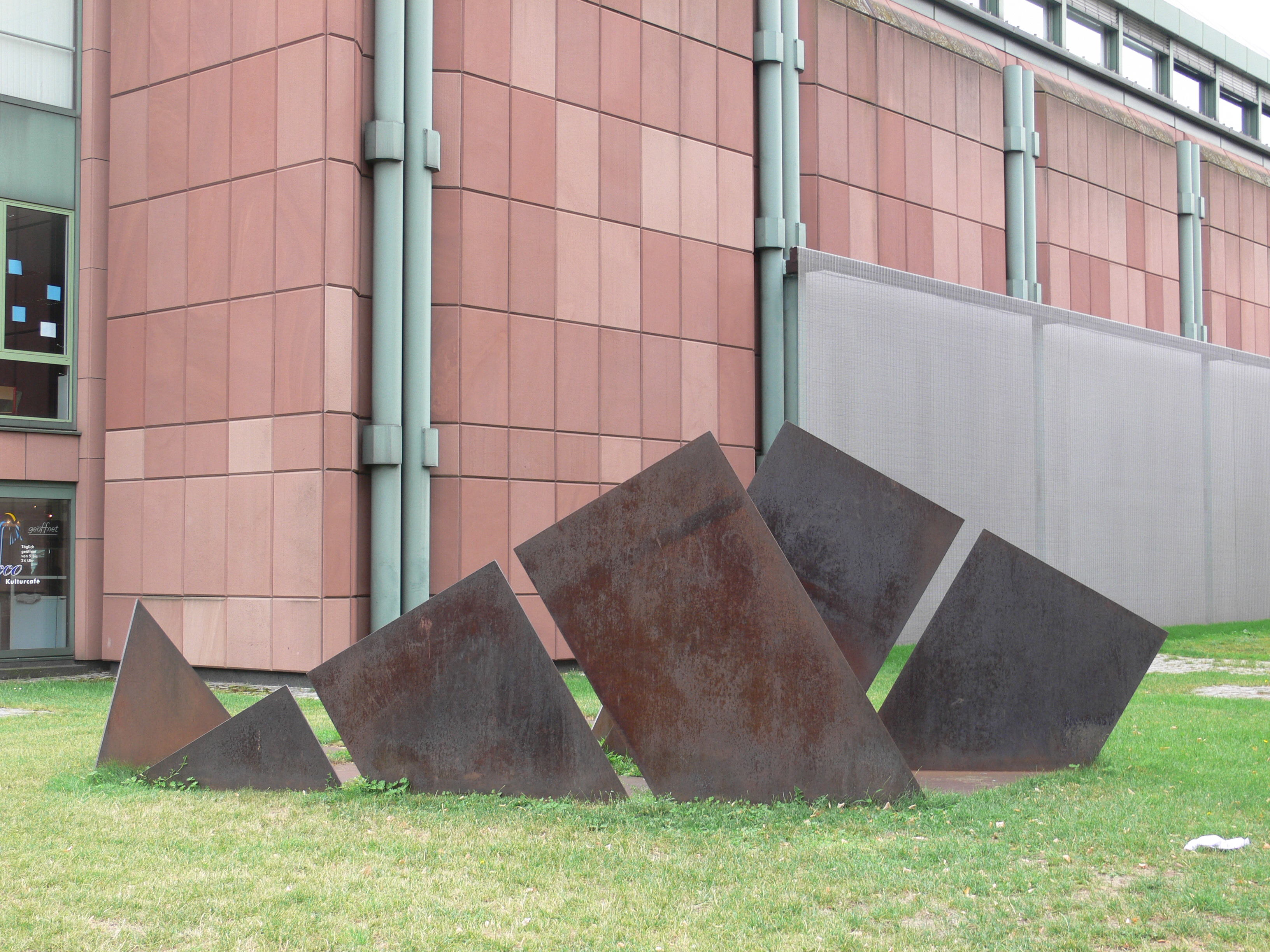 Kunsthalle Mannheim, Skulpturengarten Wilfried Hagebölling: Bodenstück, 1980, Cor-Ten-Stahl